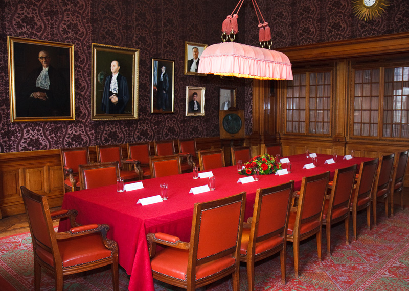 Salle rouge dans laquelle se déroule les cérémonies de signature d'actes importants de la Cour internationale de Justice